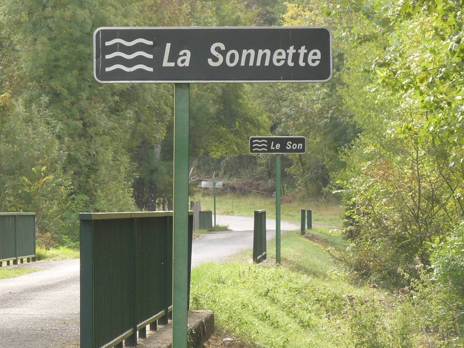 le Son et la Sonnette à Ventouse, Charente, France